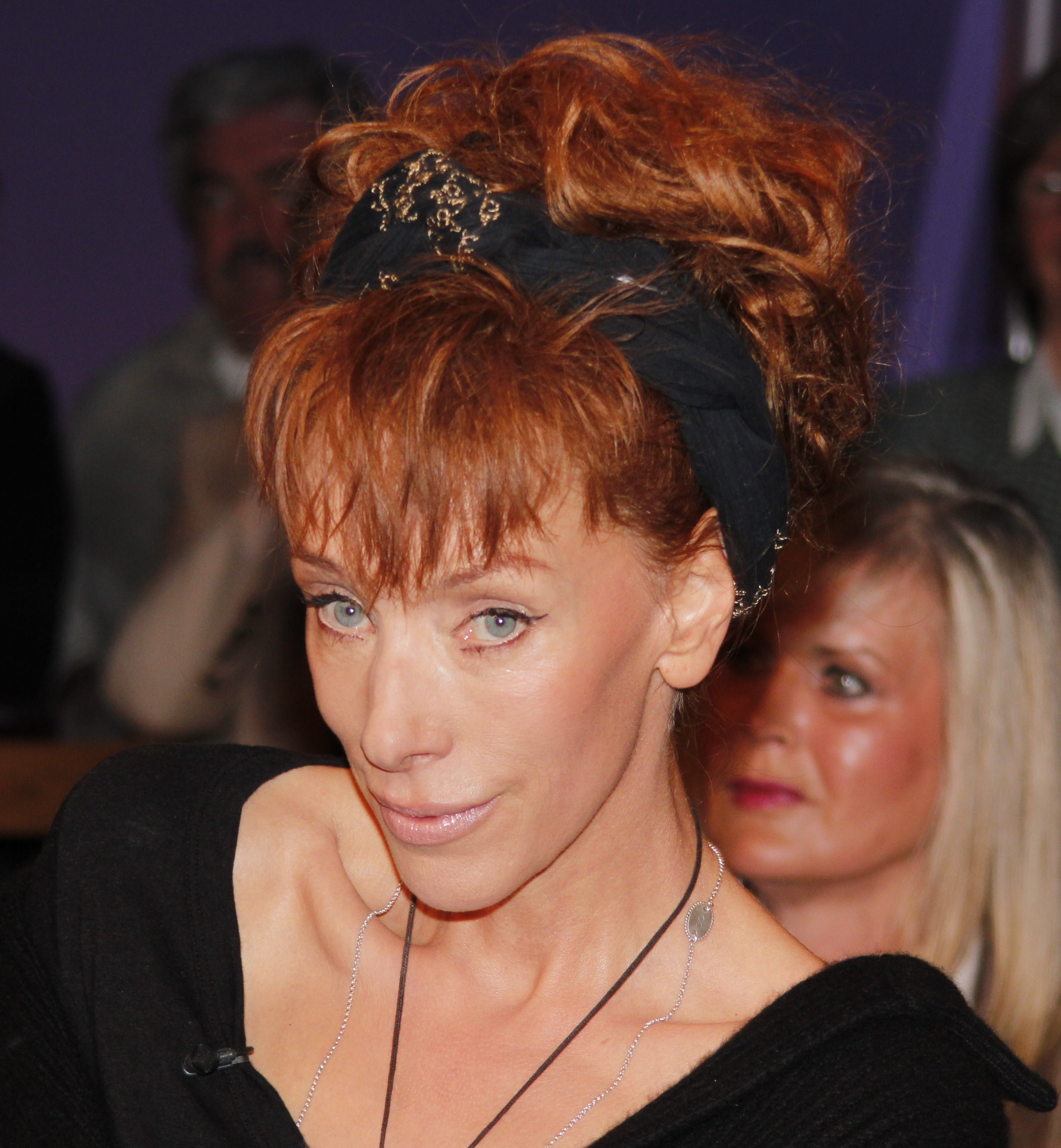 Sibylle Berg (* 2. Juni 1962 in Weimar) ist eine deutsche Schriftstellerin und Dramatikerin. Sie schreibt Romane, Essays, Kolumnen und Theaterstücke.